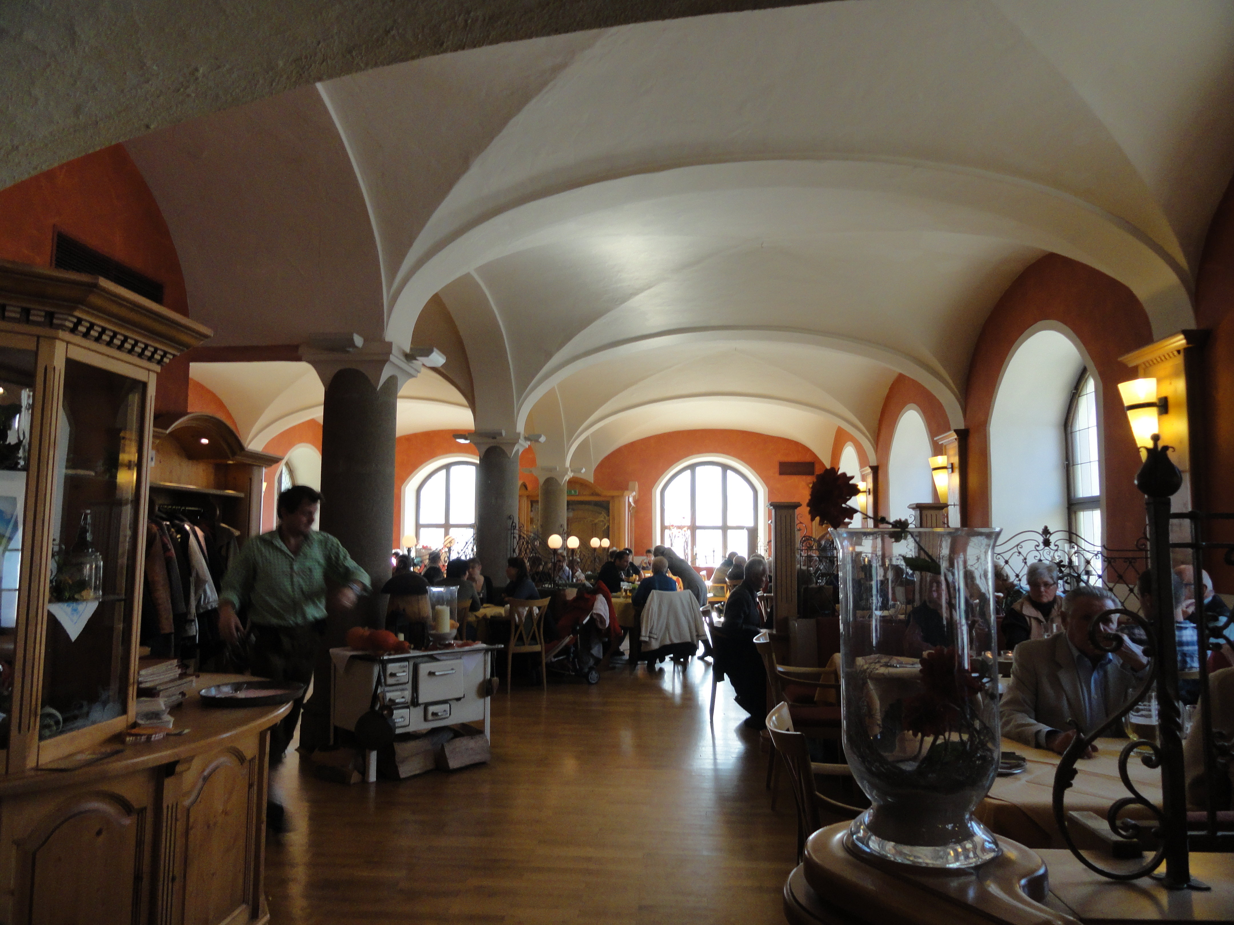 Alte Brauerei "Zum Stift"